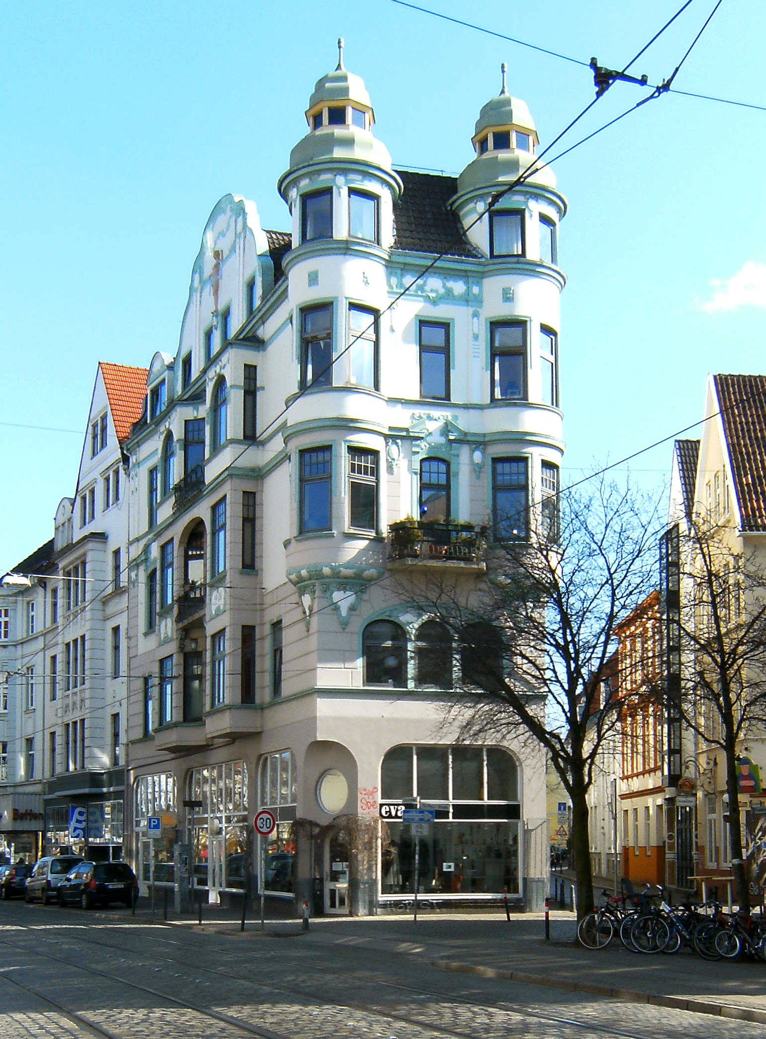 Wohn- und Geschäftshaus Ostertorsteinweg 68/69 / St.-Pauli-Straße 2 in Bremen-Ostertor; erbaut um 1910Das abgebildete Objekt ist ein geschütztes Kulturdenkmal in der Freien Hansestadt Bremen, mit der Nr. 0973 beim Landesamt für Denkmalpflege registriert.